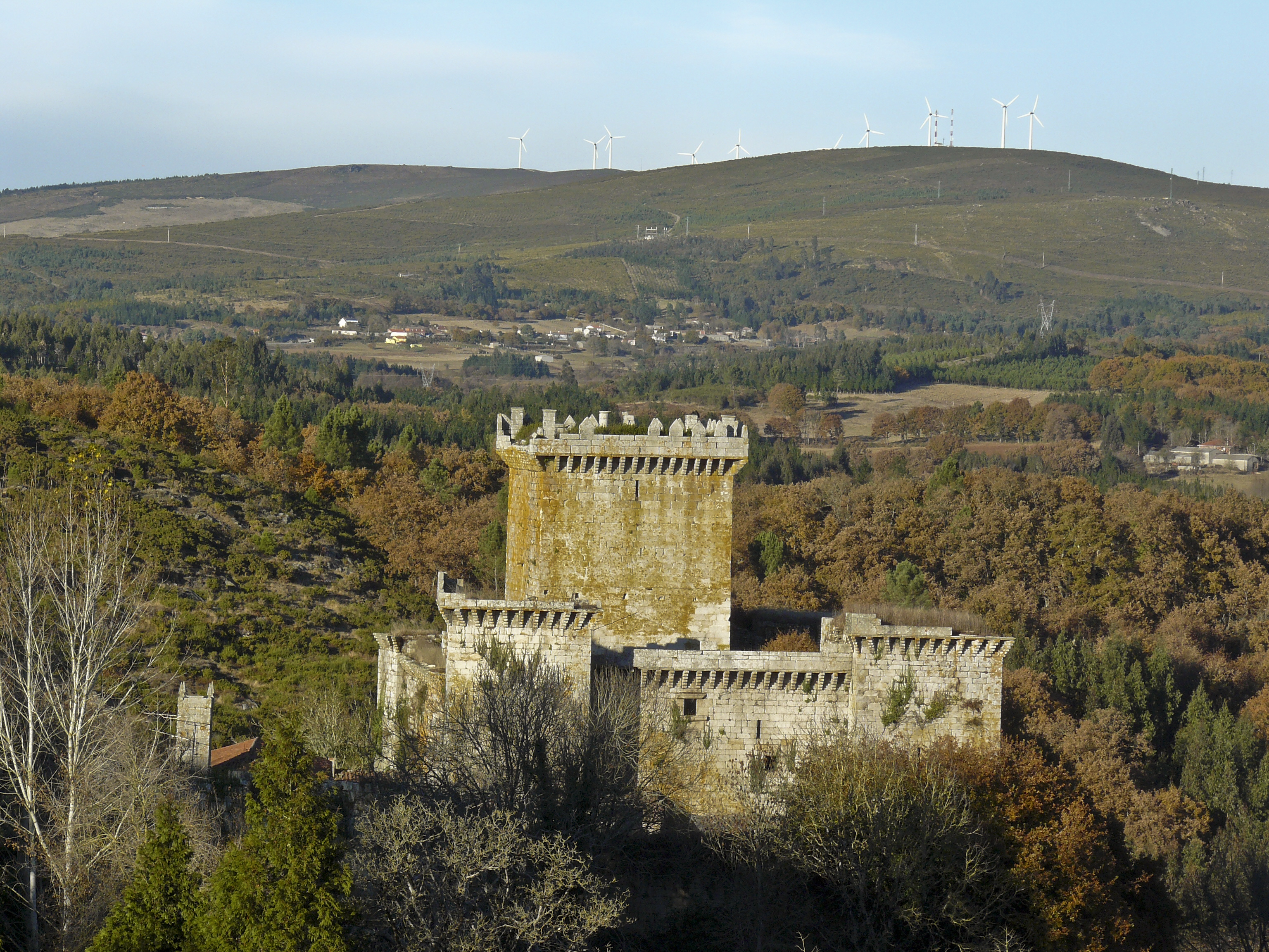 Vista xeral do Castelo de Pambre